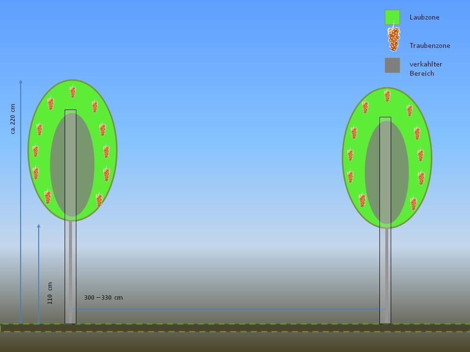 Minimalschnitterziehung